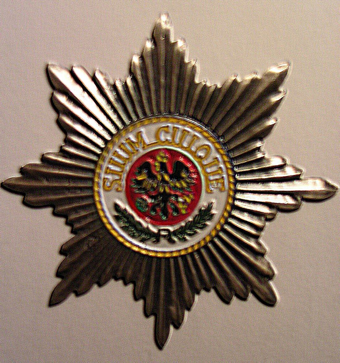 Stern des Schwarzen Adlerordens (schlechtes Replikat; KEIN Original!), gestiftet 17. Januar 1701 von Friedrich III./I., mit Devise "Suum Cuique" (Jedem das Seine).